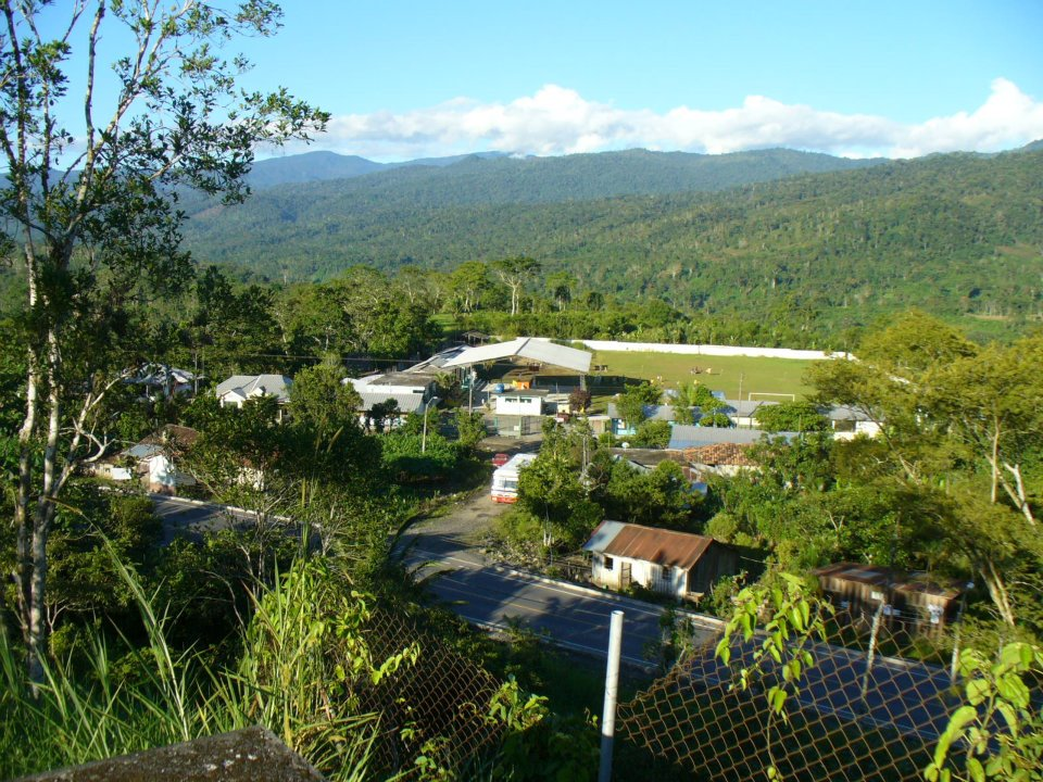 Vista panorámica de la Parroquia Tayuza. Se puede apreciar el paso de la troncal Amazónica y la cordillera de Cutucú en el fondo.